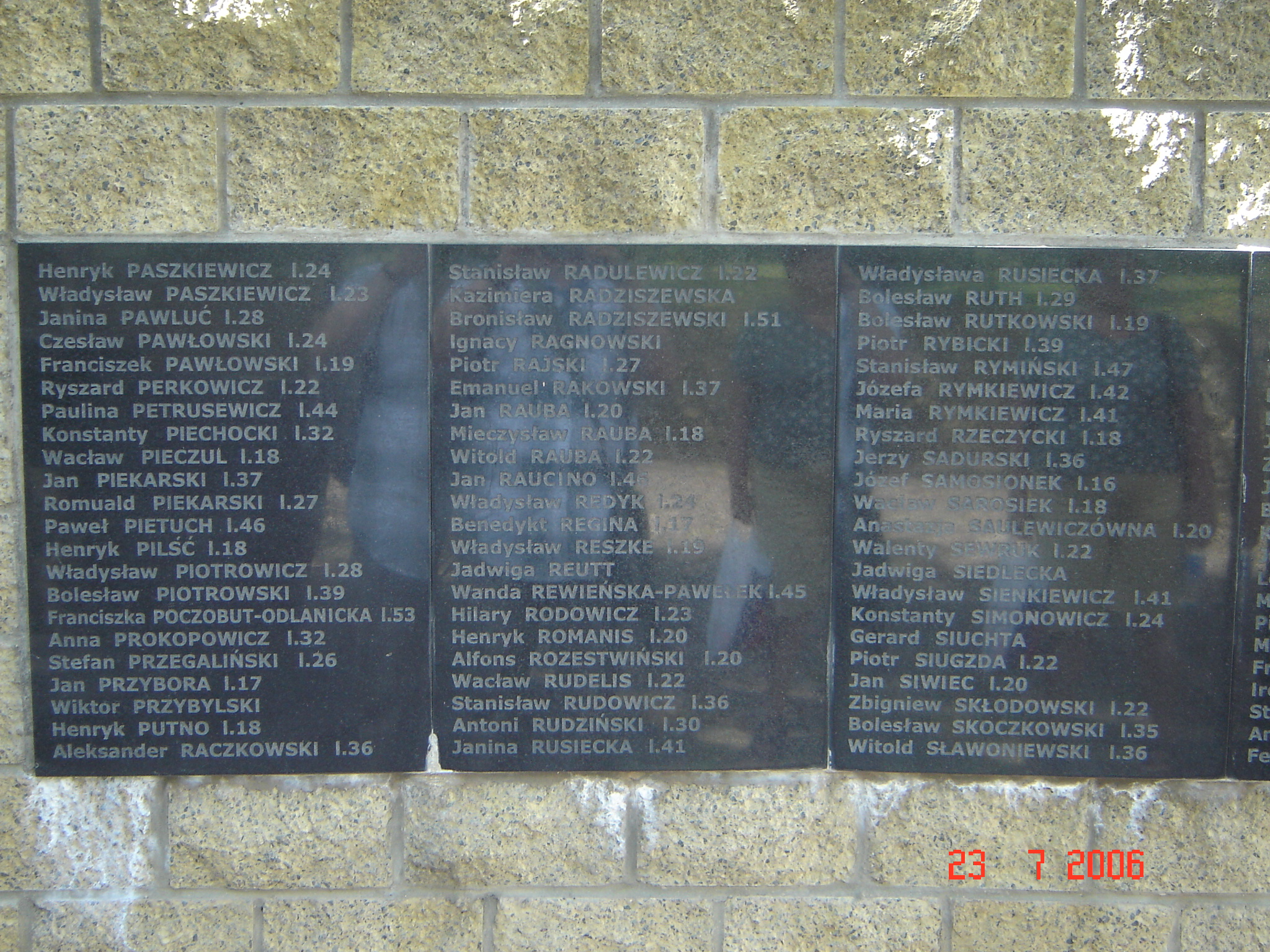 Jedna z tablic upamiętniająca pomordowanych Polaków w Ponarach